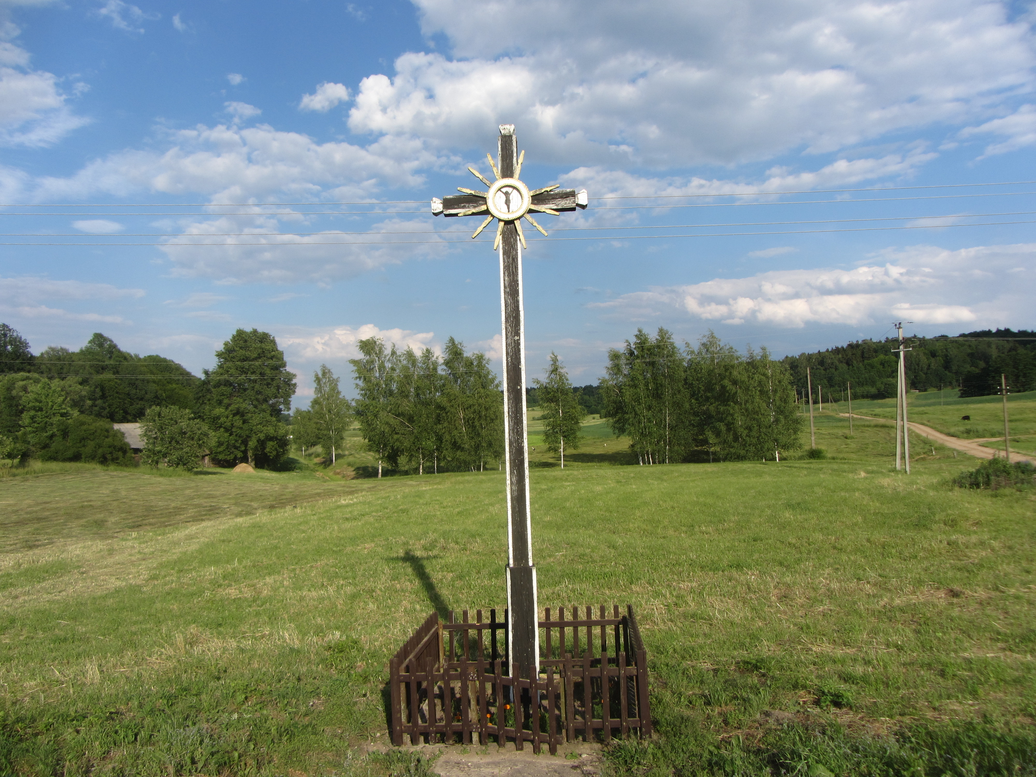 Pivašiūnų sen., Lithuania